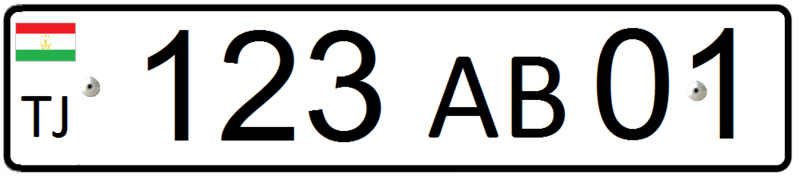 Номерной знак автомобилей юридических лиц Таджикистана, с 2010 года